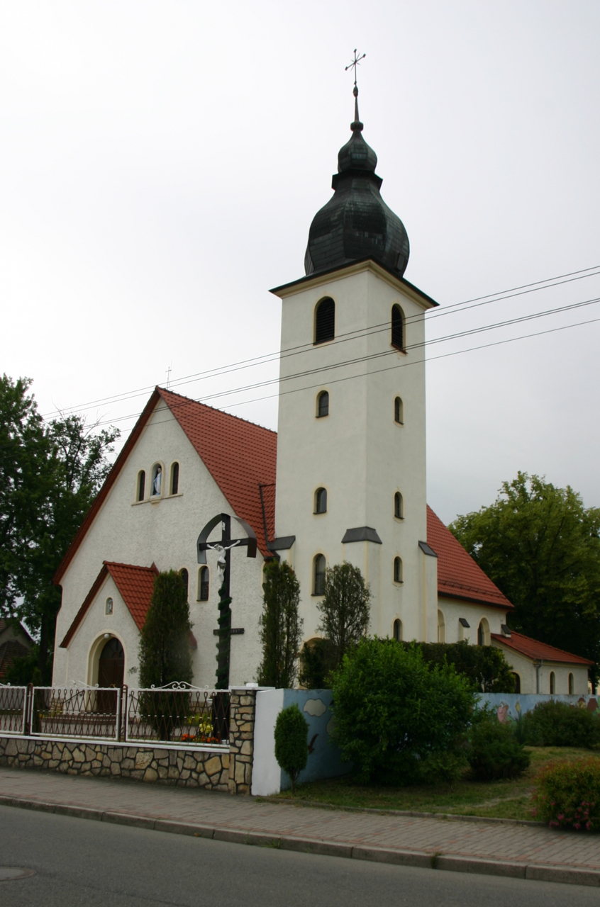 Przywory - wieś w Polsce, w powiecie opolskim.